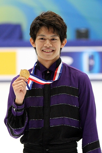 Takahiko Kozuka at the 2010 Cup of China podium.